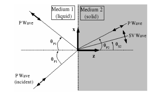 Onde longitudinale (à gauche) ou transversale (à droite) arrivant sur une interface Fluide (non visqueux)-Solide